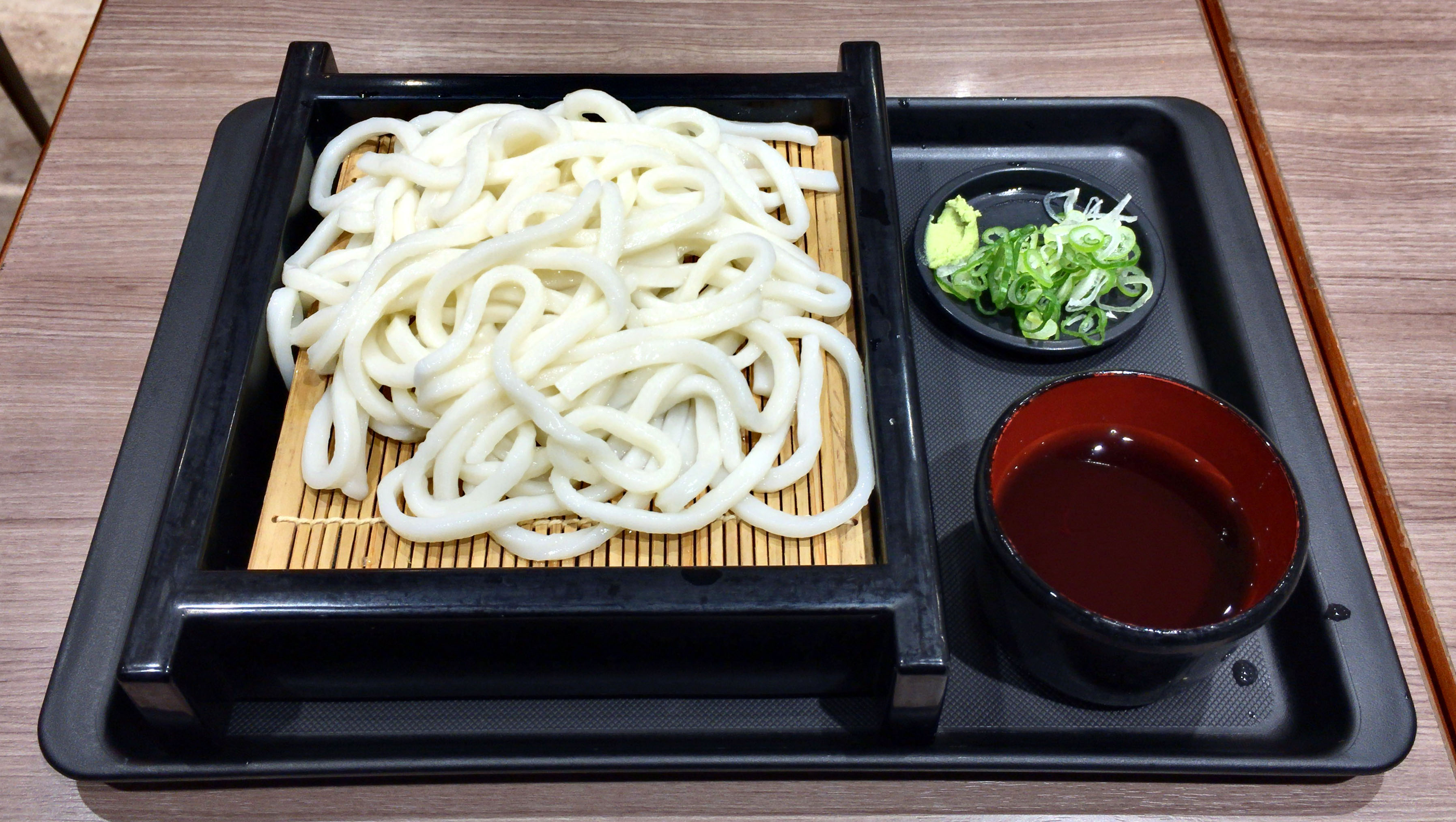 富士そば もりうどん（310円）